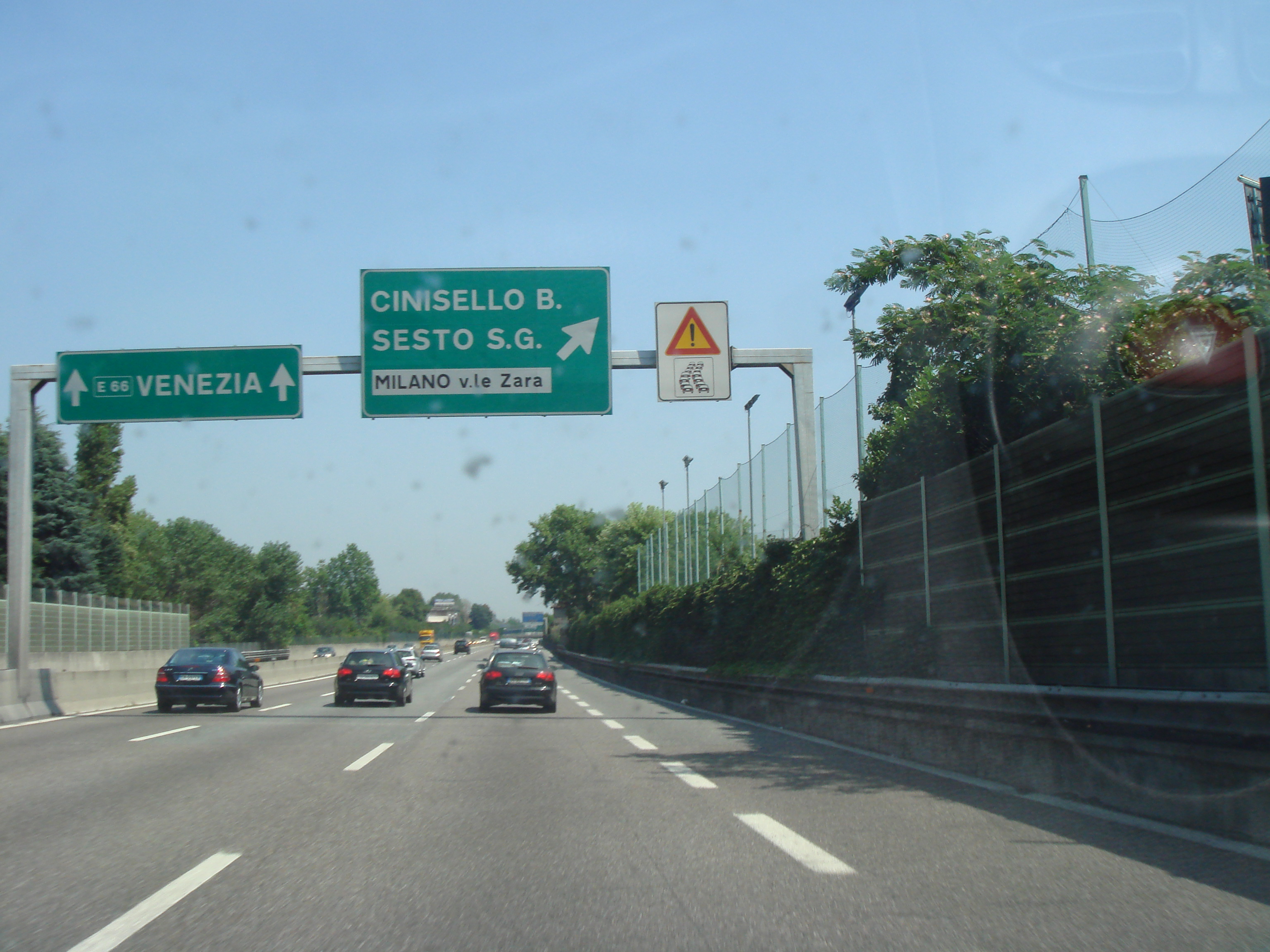 Strada europea E64 (ma segnalata come E66!) nei pressi di Milano